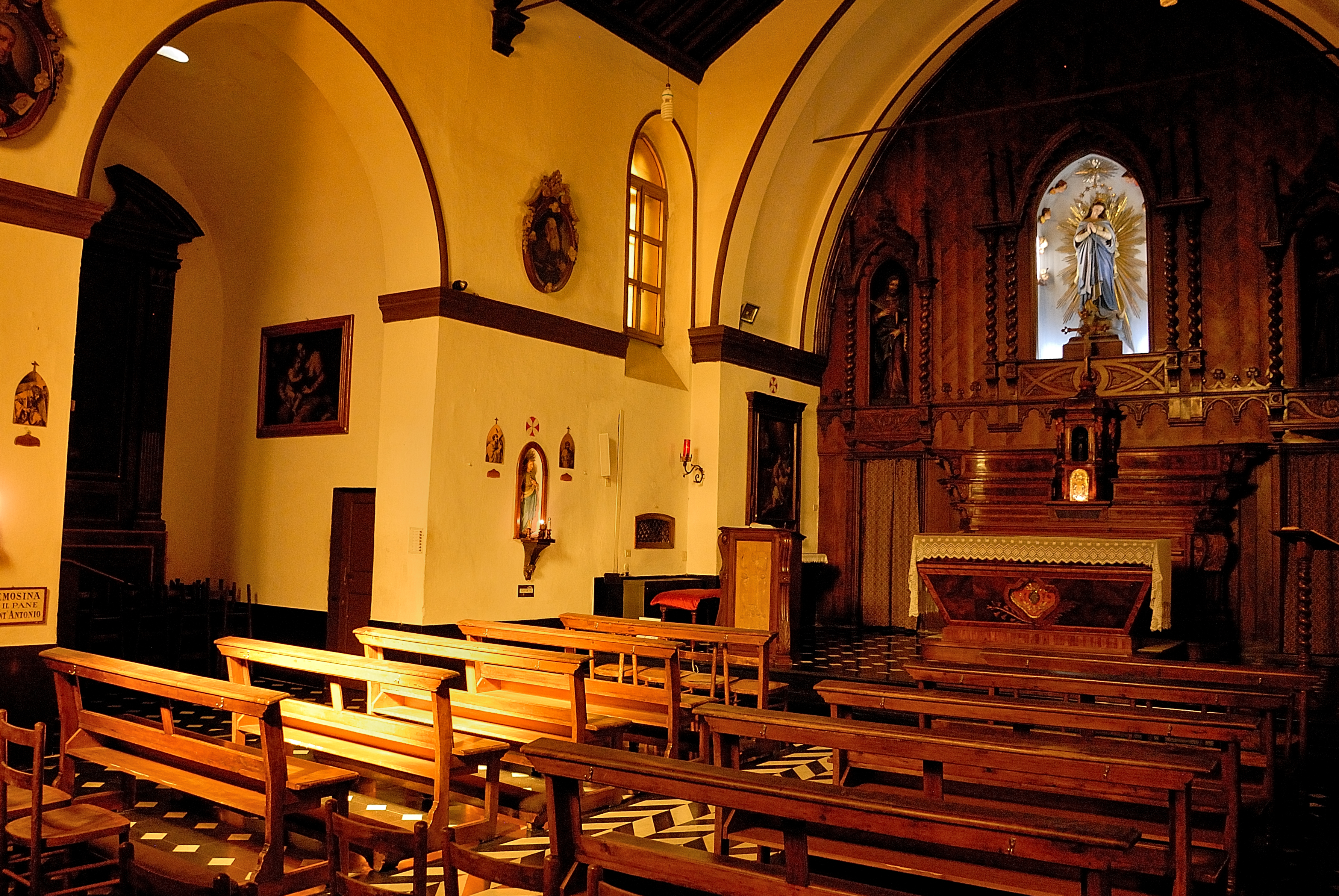 Convento e Chiesa dei Frati Cappuccini - San Barnaba This is a photo of a monument which is part of cultural heritage of Italy.